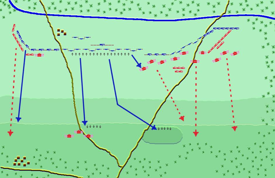 Description